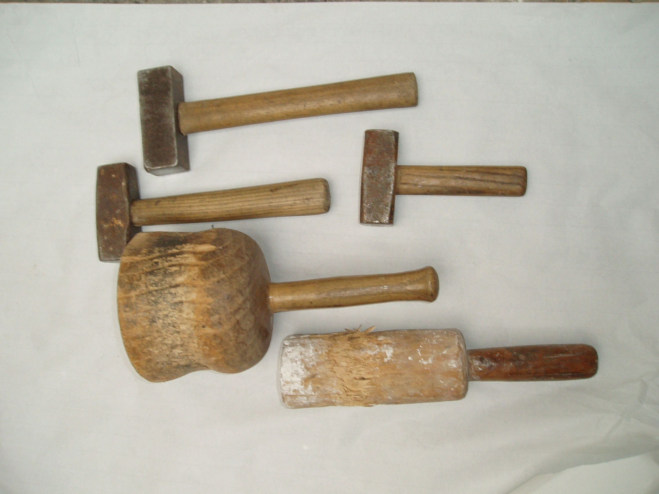 Kamenická palička